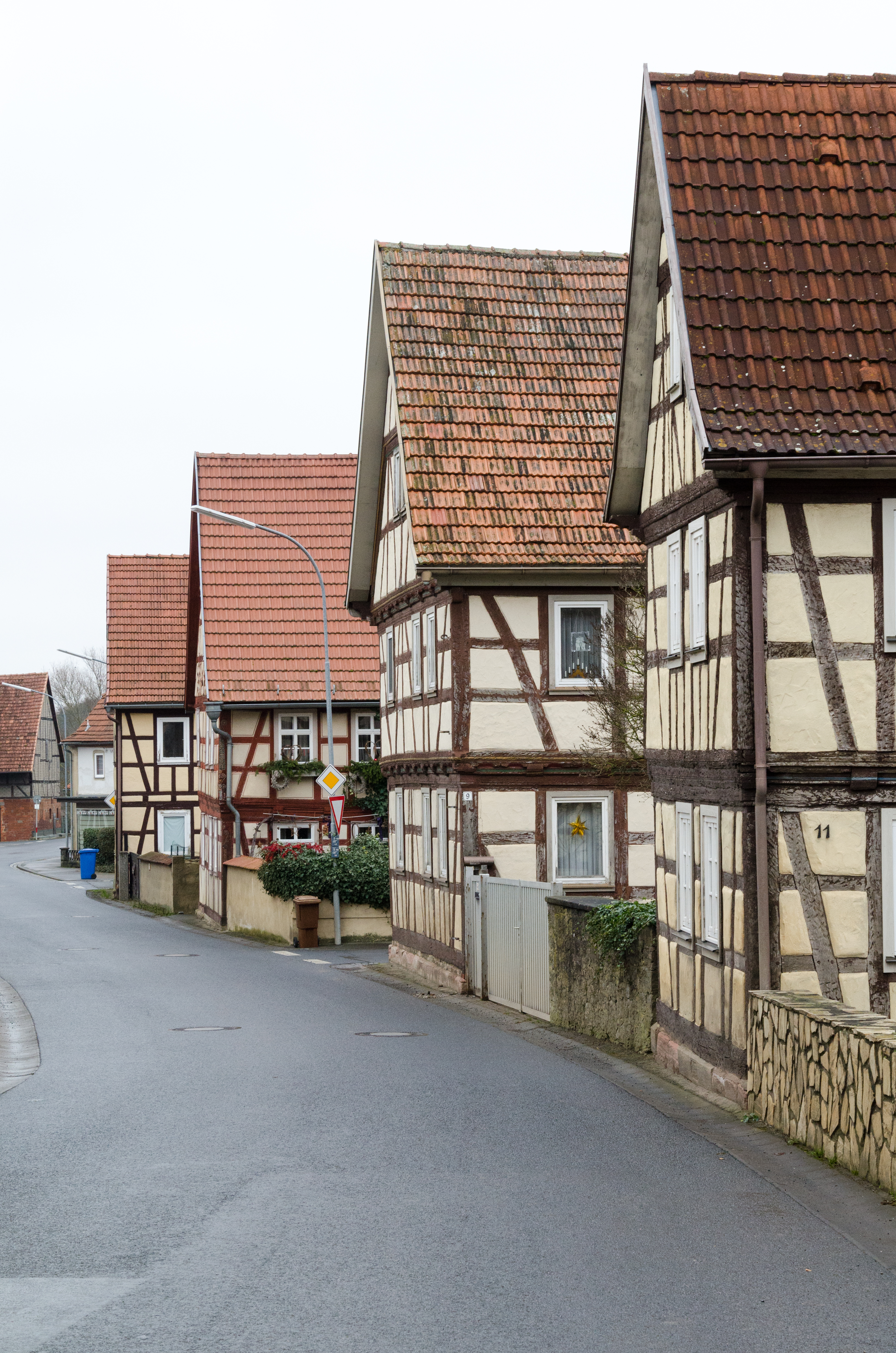 Ostheim v.d.Rhön, Urspringen, Hauptstraße 11, 9, 7, 5